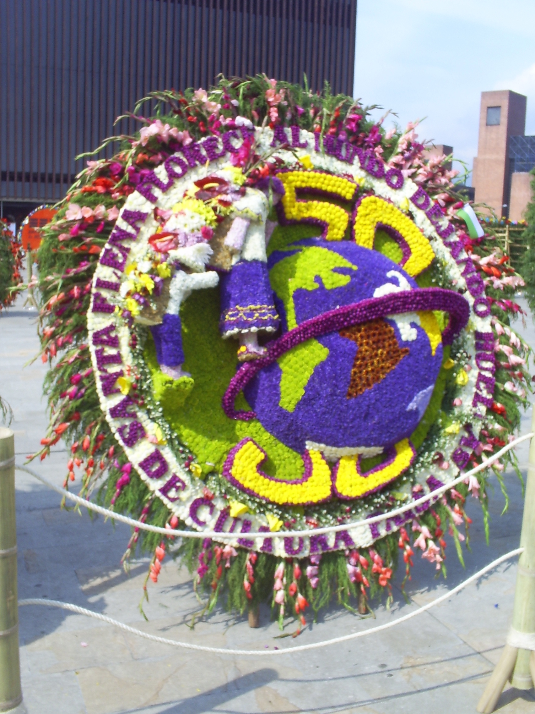 Desfile de Silleteros 2007, silletas expuestas después del desfile. Medellín, Colombia.